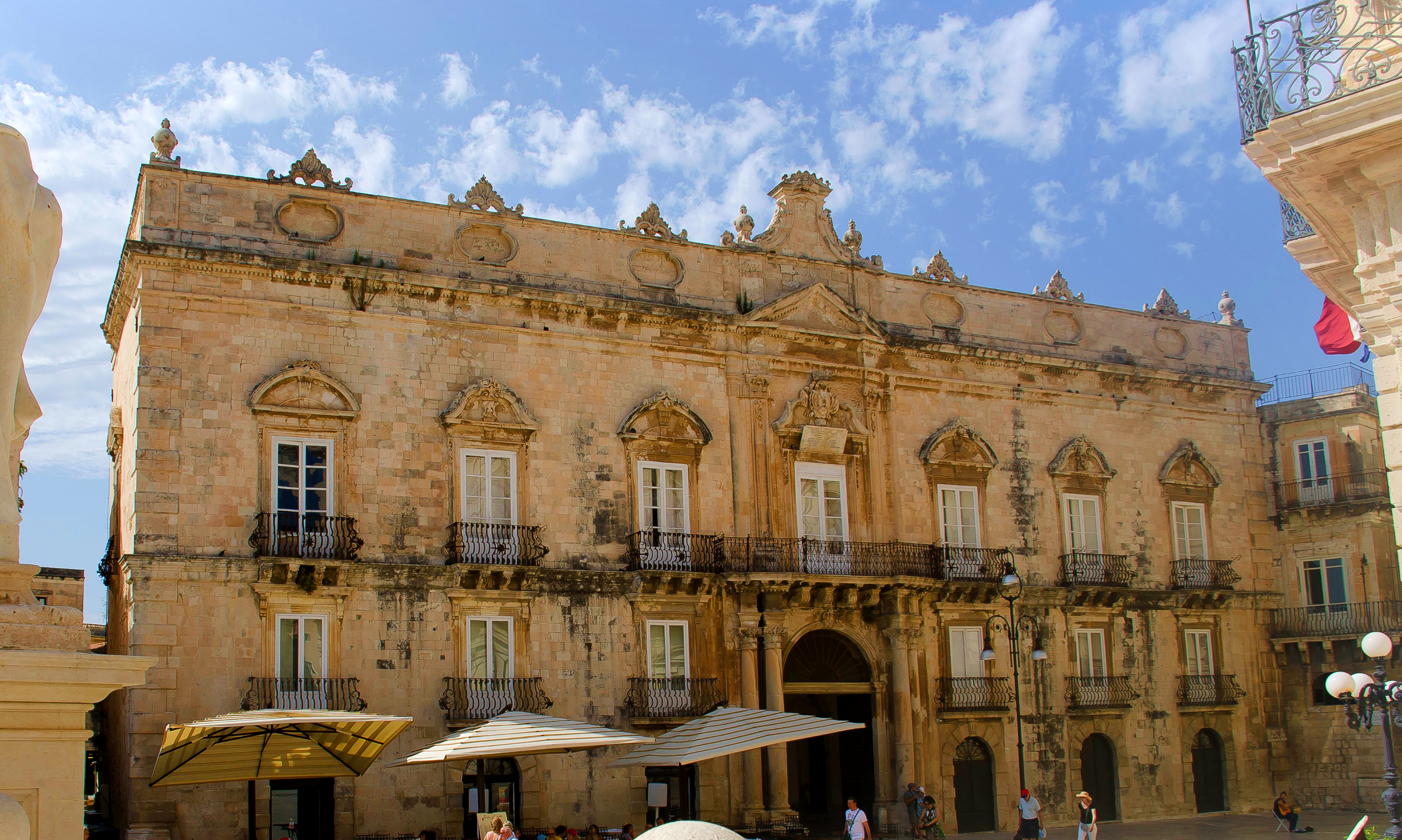 Palazzo Beneventano del Bosco: Ortigia, piazza del Duomo. Palazzo Settecentesco nel quale vi alloggiarono l'ammiraglio Horatio Nelson (1798) e il re Ferdinando IV di Borbone (1806). Nello stesso edificio, nel 1529, vi alloggiò il primo Gran Maestro dell'Ordine di Malta Philippe de Villiers de L'Isle-Adam.